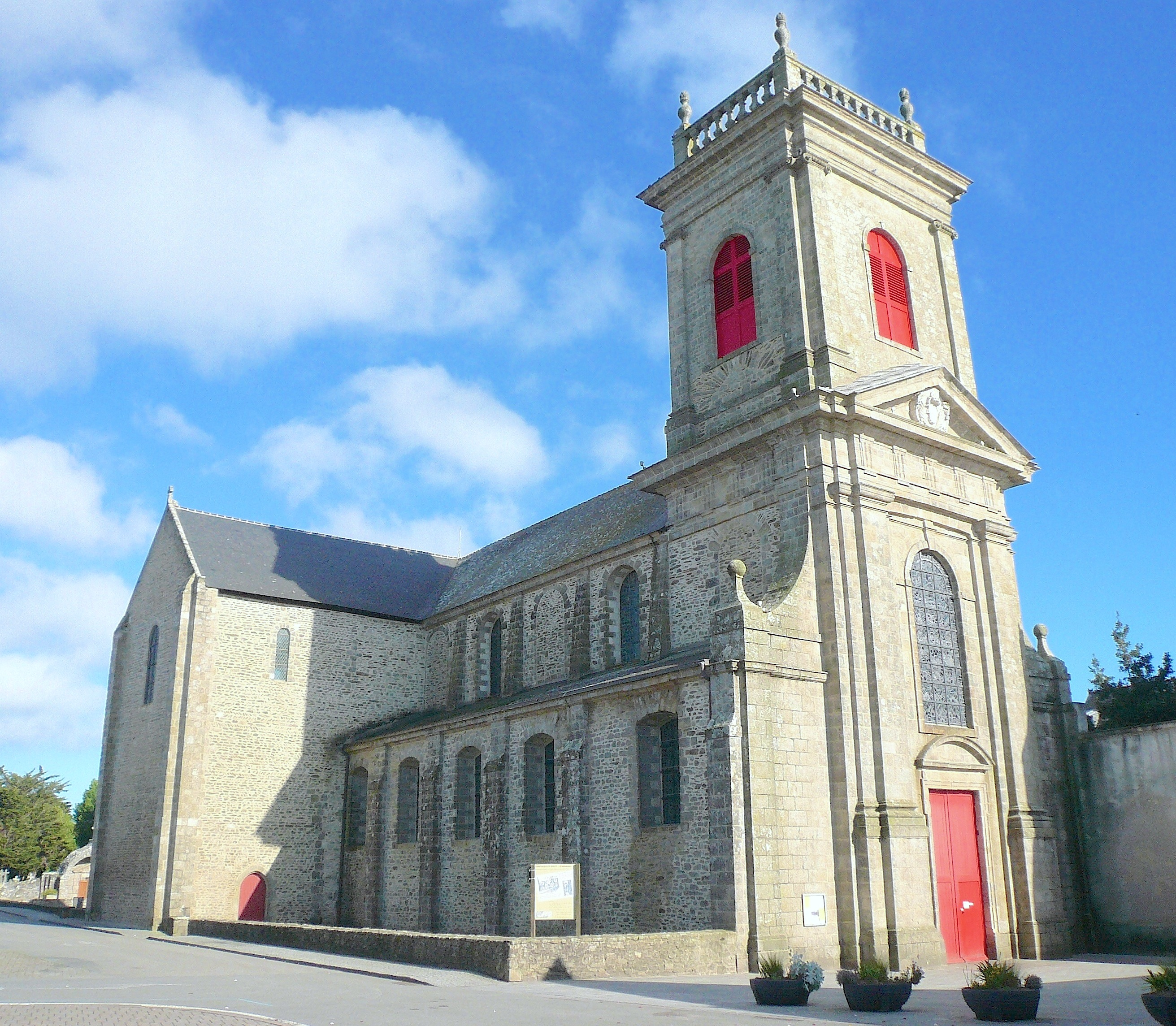 Abbaye de Saint-Gildas de Rhuys sur la Presqu'île de Rhuys dans le Morbihan.